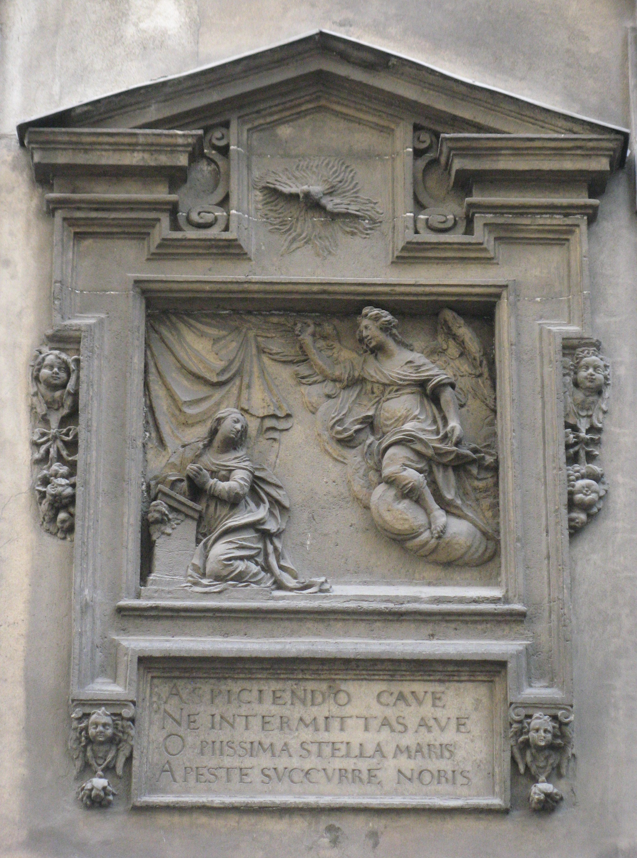 Hausrelief Mariä Verkündigung, Bauernmarkt 1, Wien-Innere Stadt